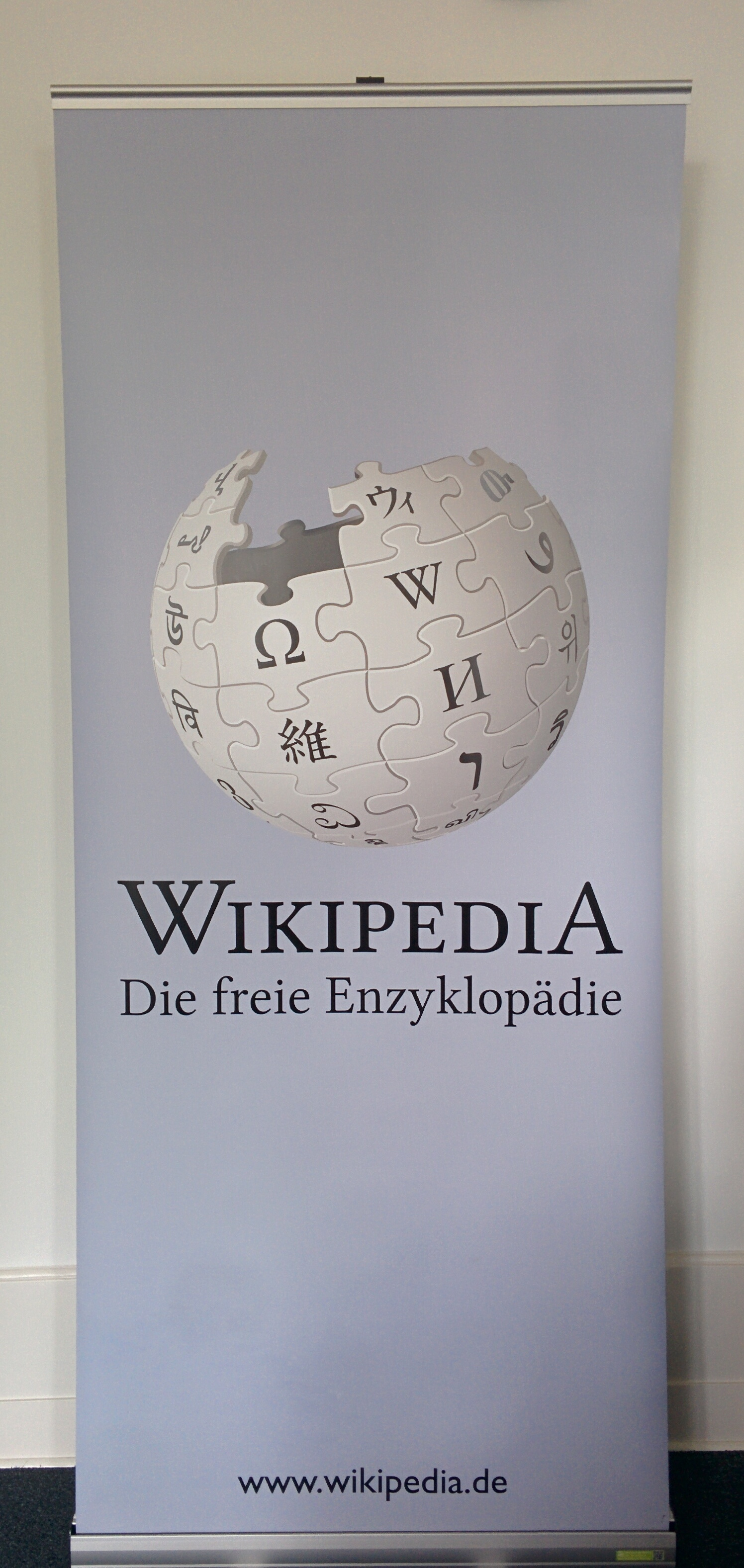 Roll-up mit Wikipedia-Logo, auszuleihen über den Technikpool